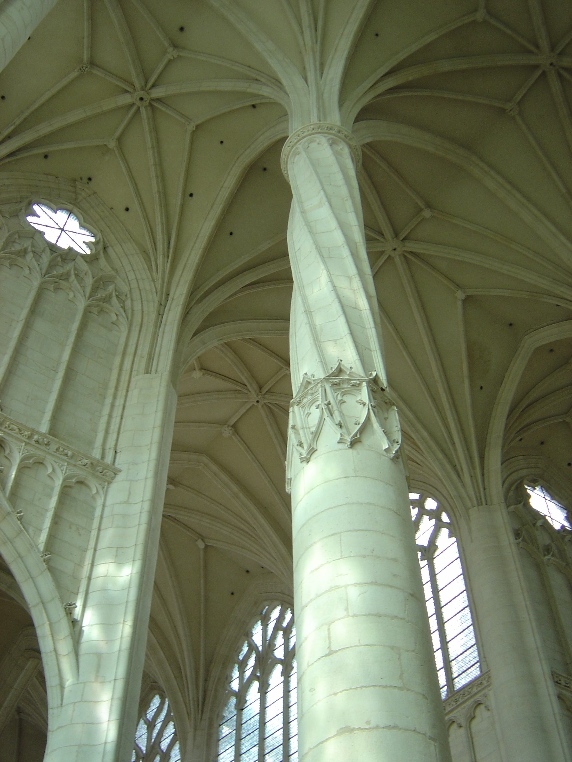 Cannelure torse d'un pilier, bras sud du transept de Saint-Nicolas-de-Port.